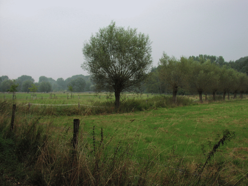 Niederrheinische Landschaft (18.08.2003)